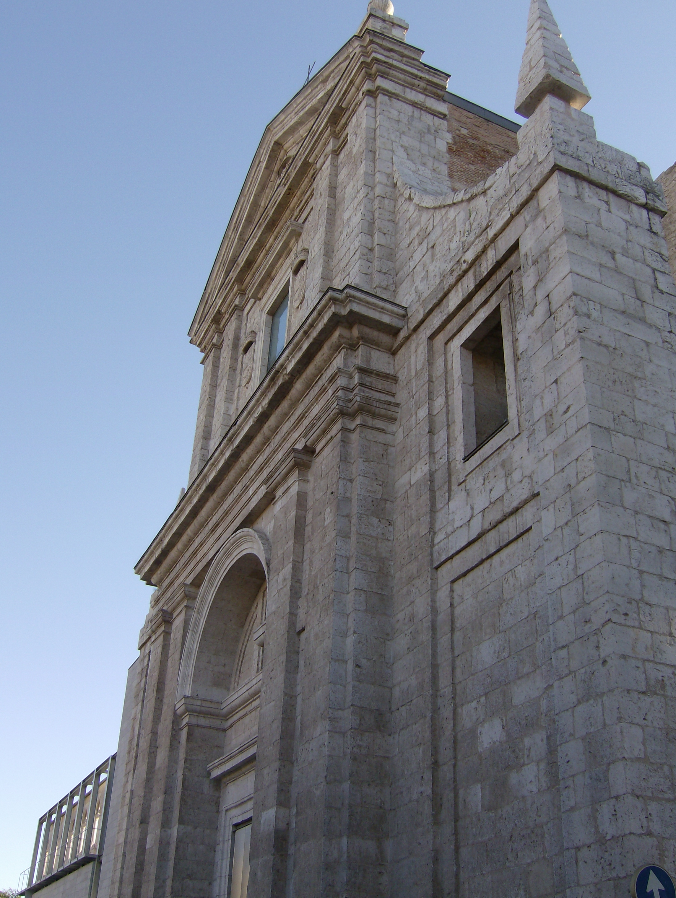 Iglesia de San Agustín (Valladolid)